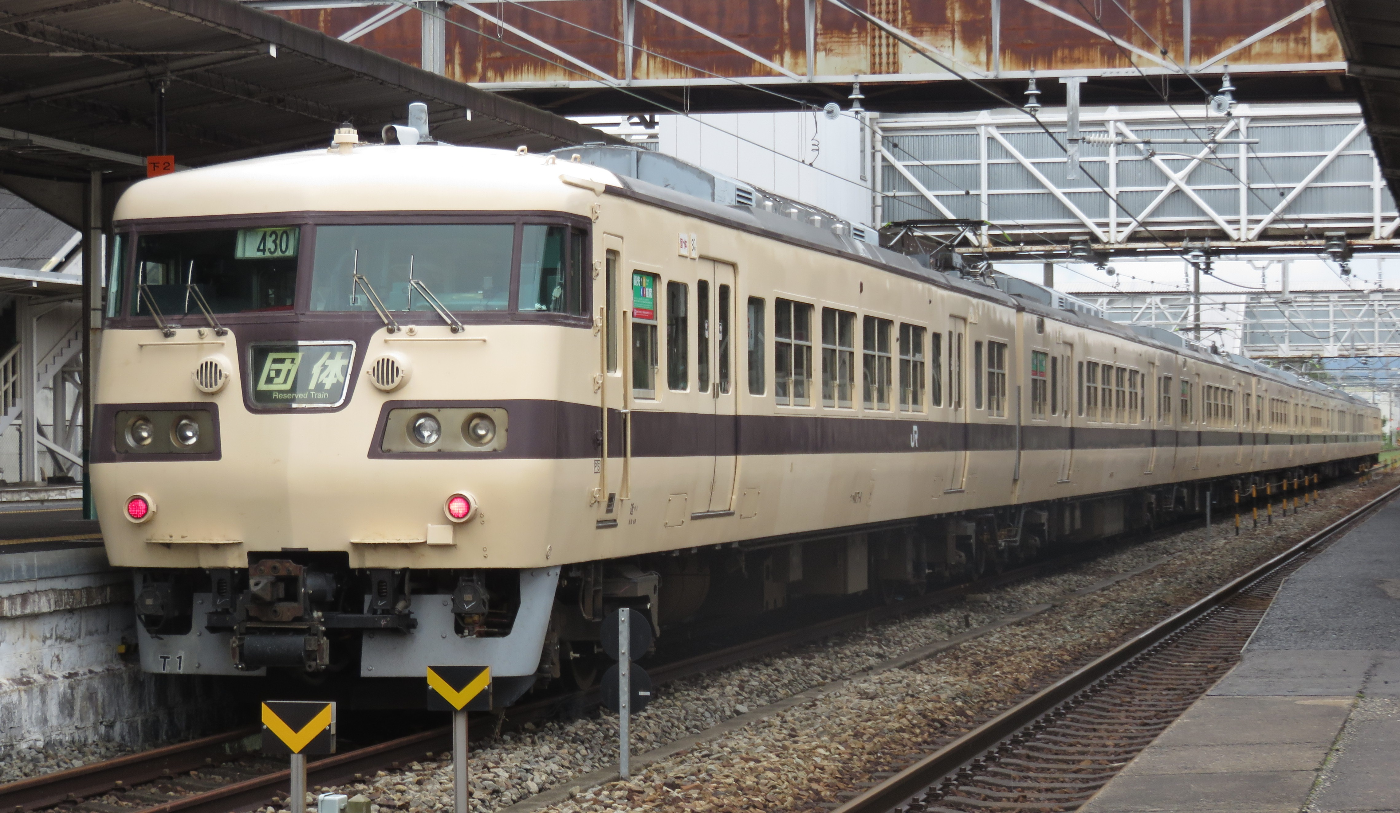 117系T1編成 団体列車